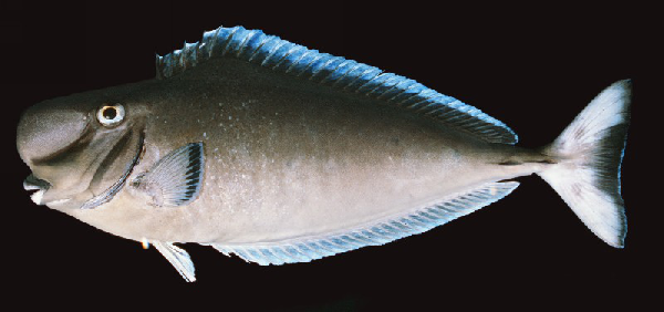 Naso tuberosus en la Gran Barrera de Arrecifes australiana